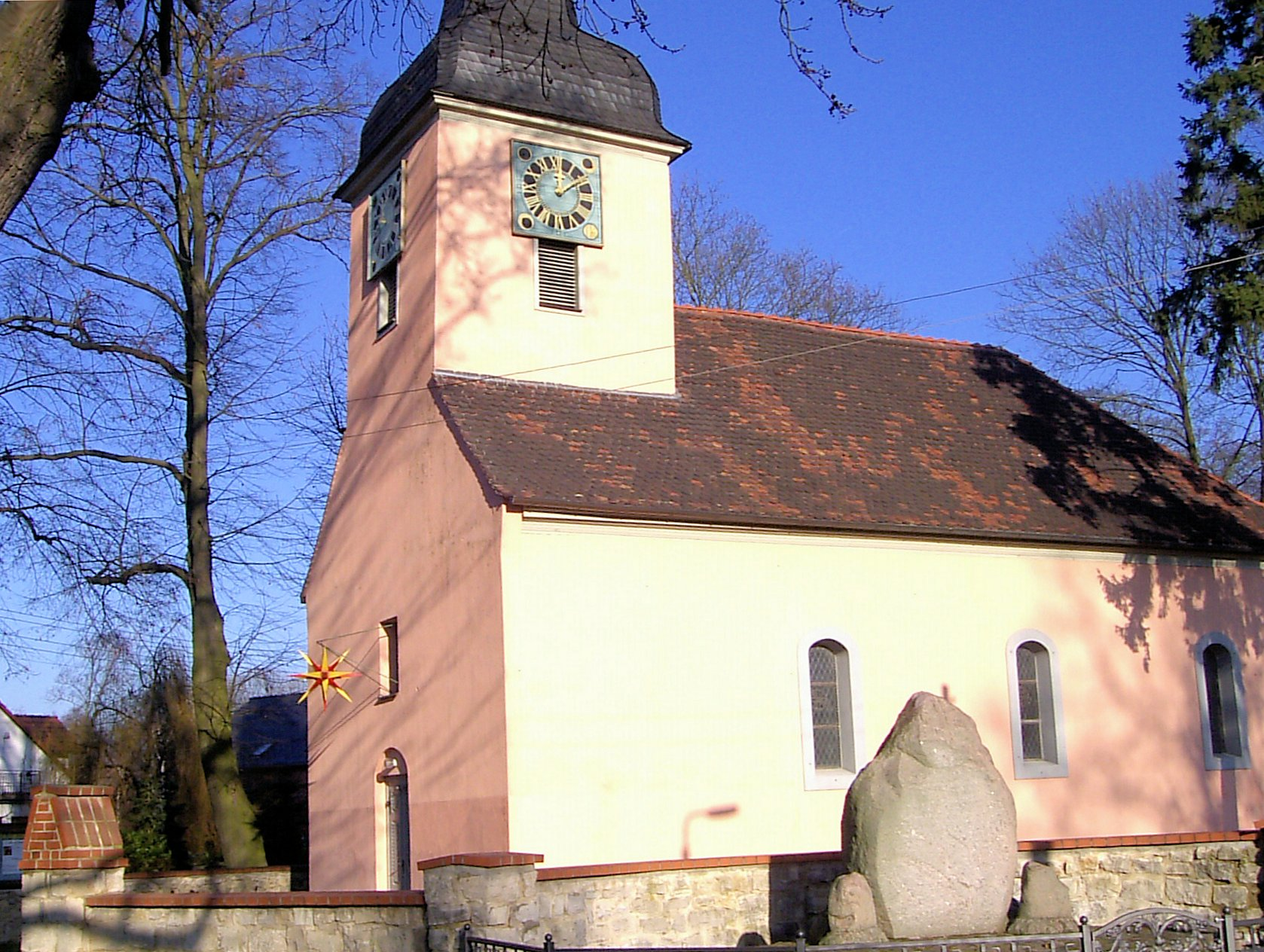 Kirche in Vogelsdorf, Brandenburg